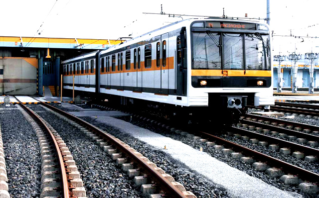 san donato